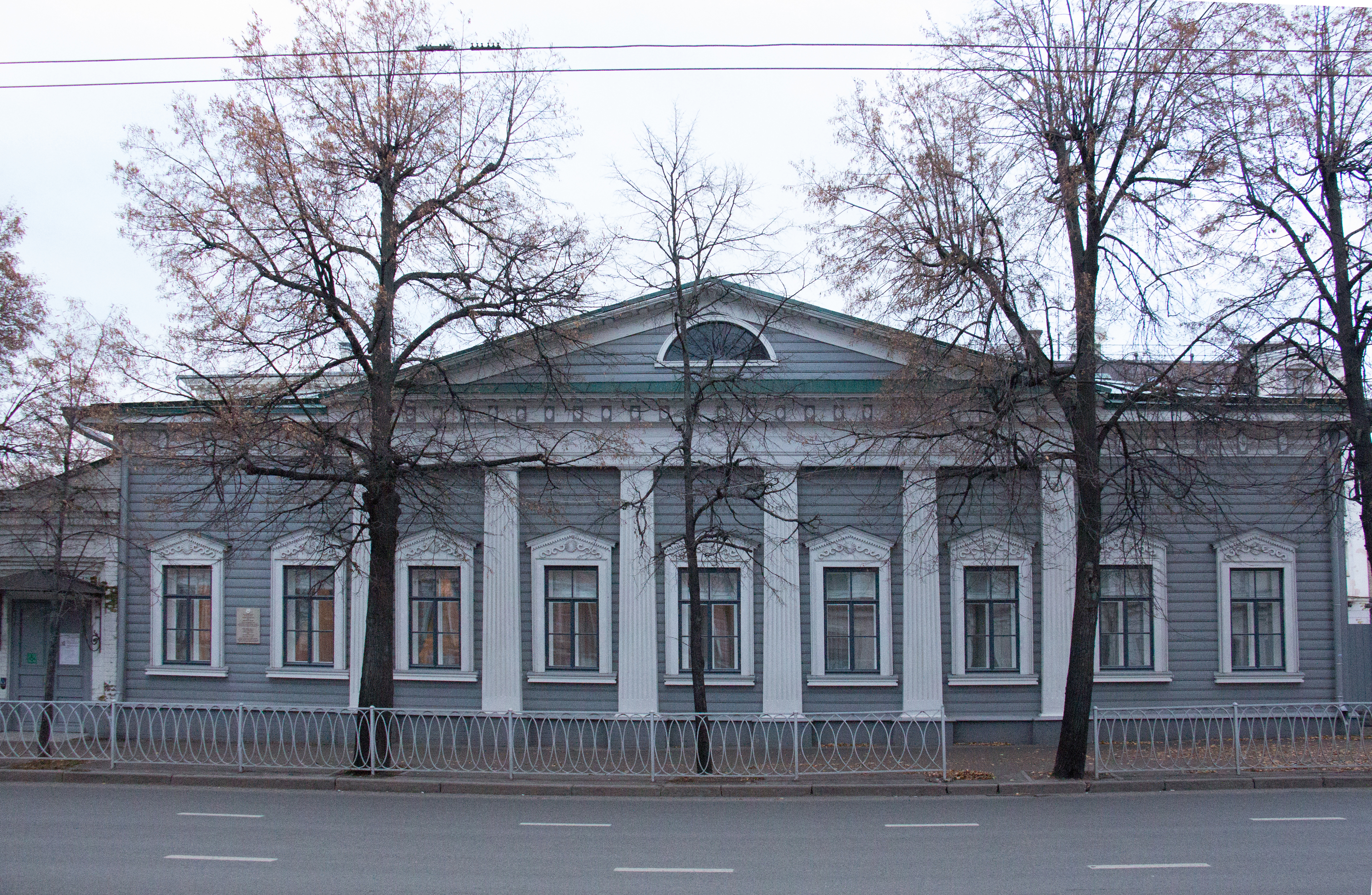 Усадьба Баратынского фасад с улицы Горького. Главный дом. Адрес улица Горького, 25, Казань, Татарстан